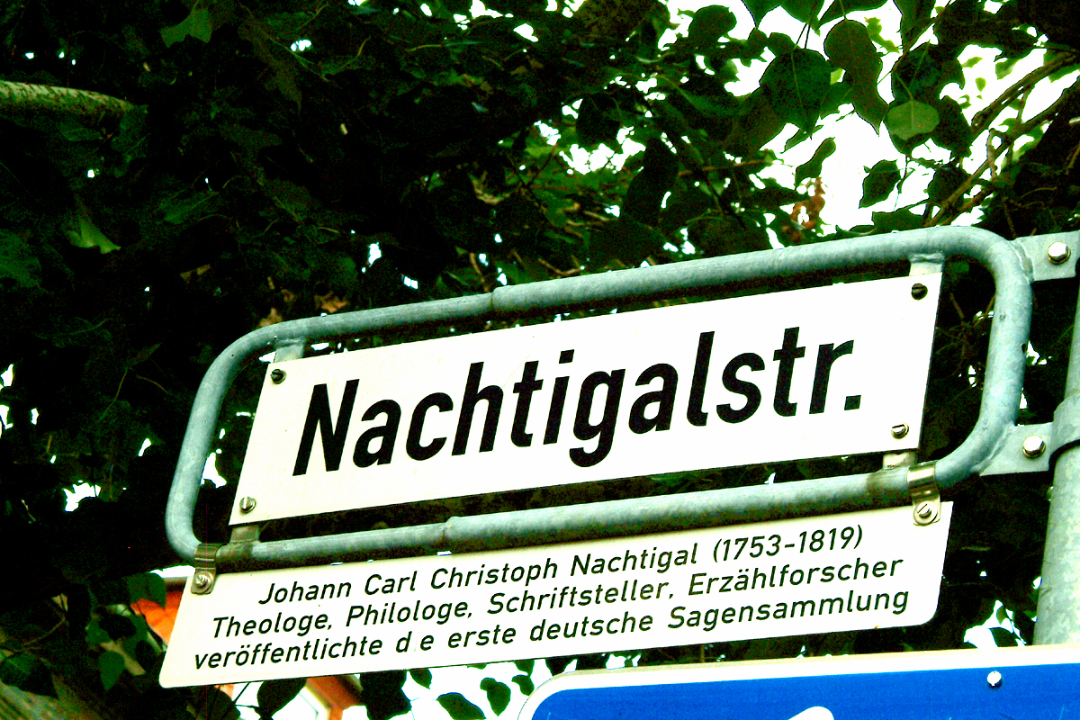 Die Nachtigalstraße in Hannover, Stadtteil Südstadt erinnert mit einer Zusatztafel an Johann Carl Christoph Nachtigal (1753-1819); der deutsche Theologe, Philologe, Schriftsteller und Erzählforscher veröffentlichte die erste deutsche Sagensammlung ...